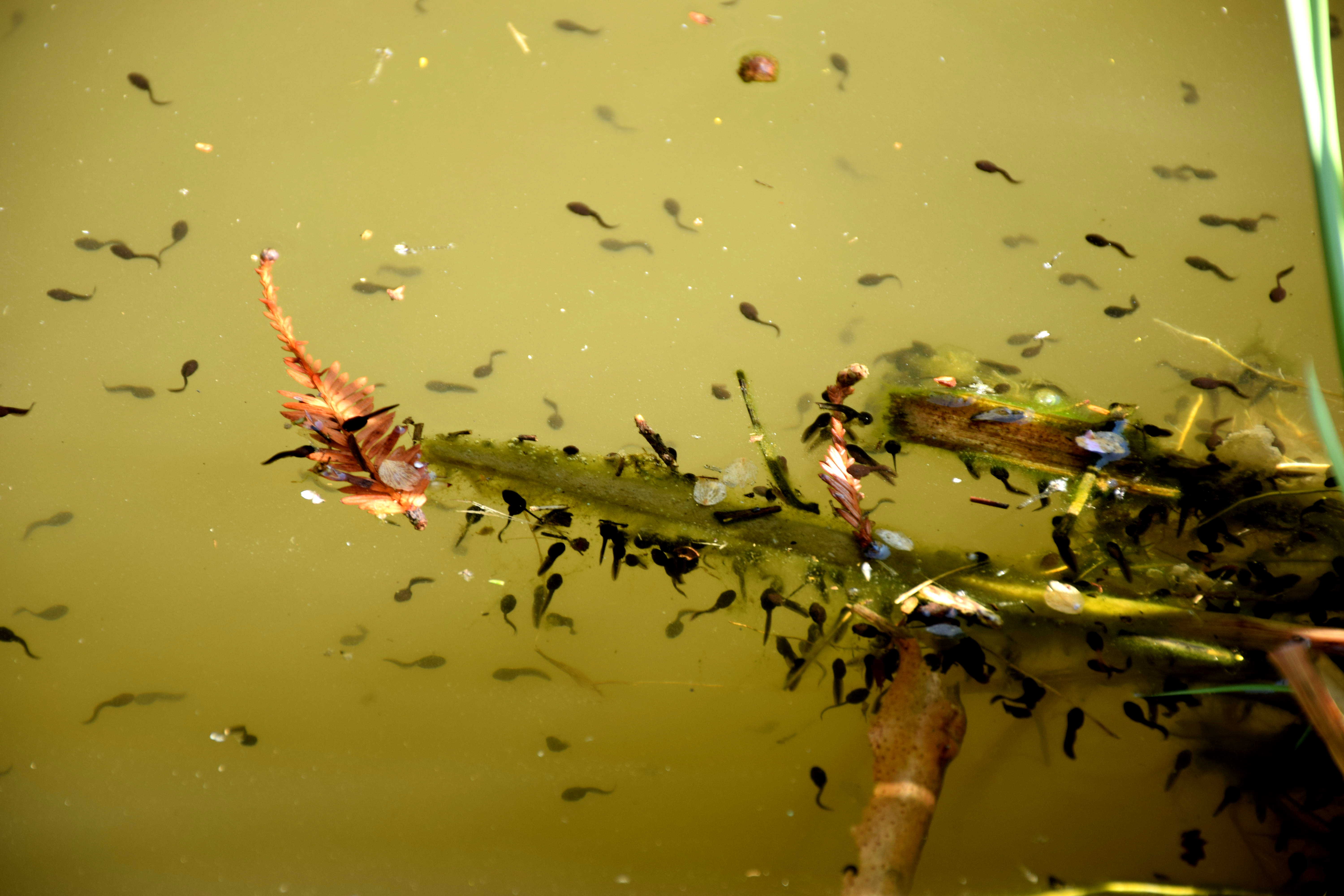 Riserva naturale del Parco Burcina-Felice Piacenza (Q3936914)